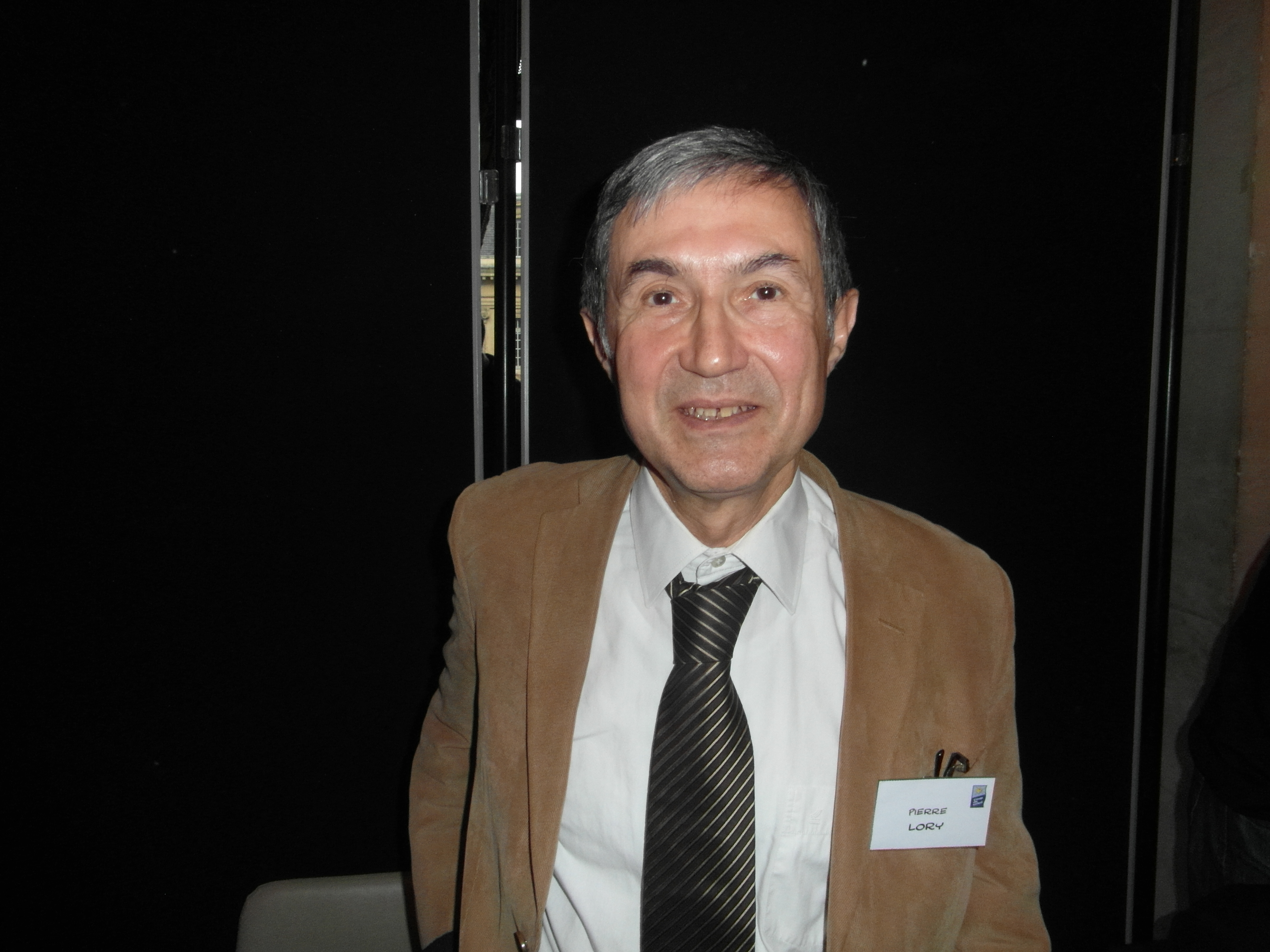 22e Maghreb des Livres, 13 et 14 février 2016